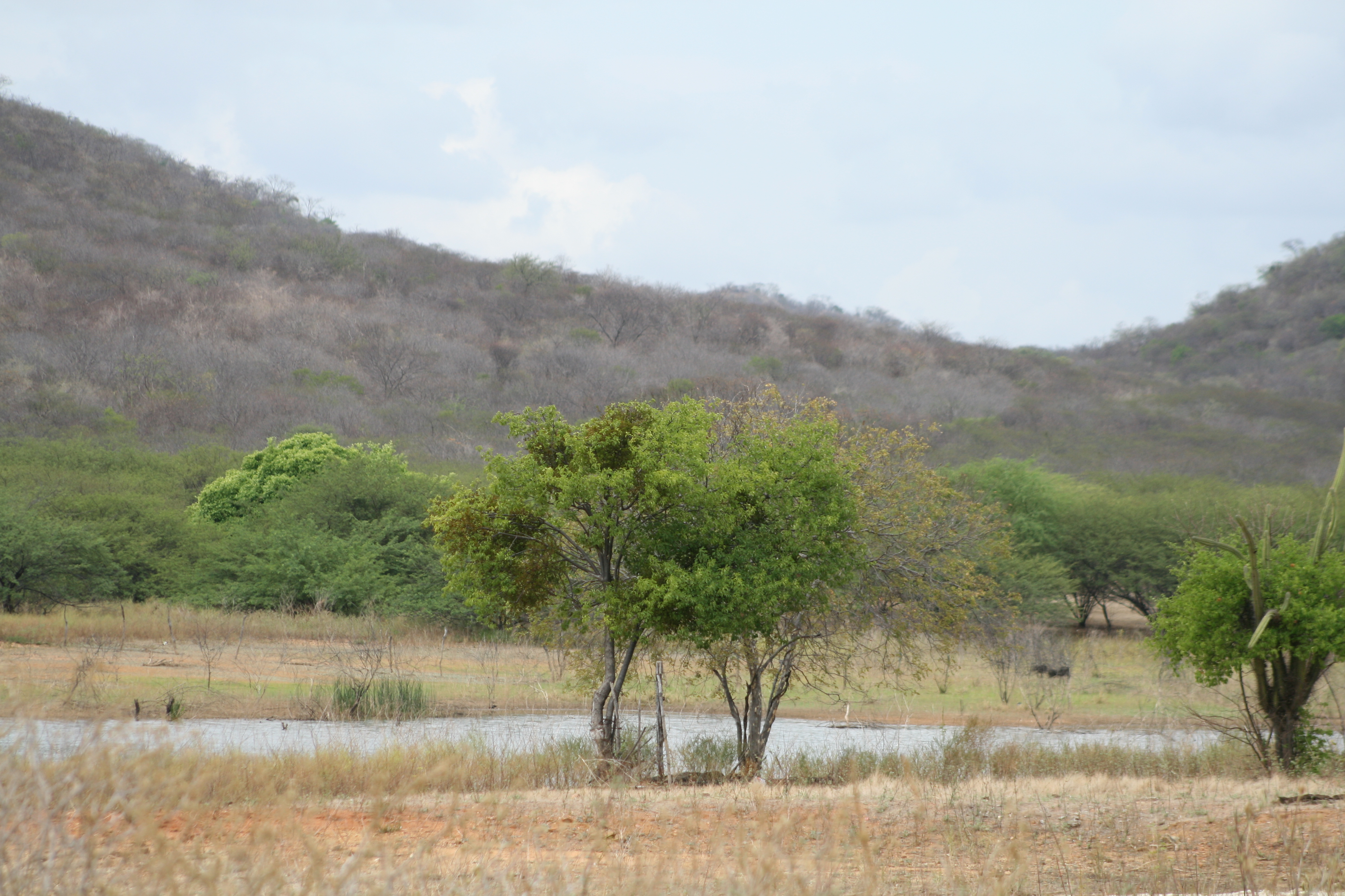 IPUEIRA- PB